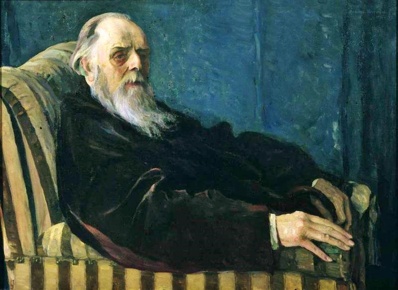 Vladimir Čertkov ritratto da Michail Nesterov poco prima della morte